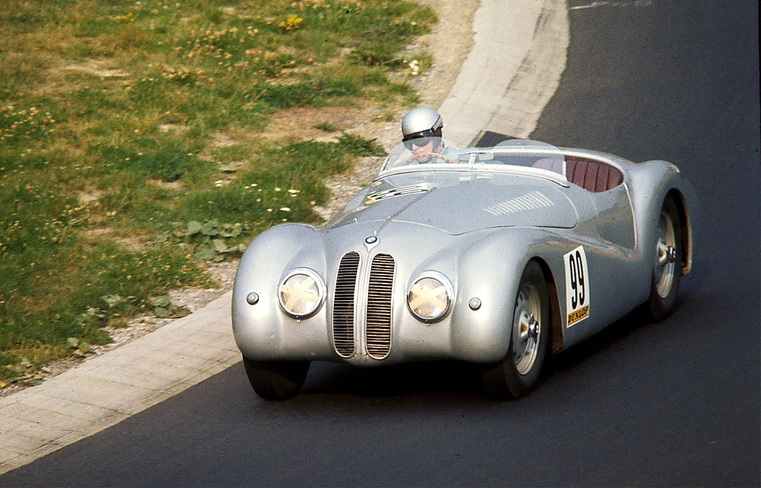 BMW 328 "Mille Miglia" beim Oldtimer-GP auf dem Nürburgring, Baujahr 1940, mit Adolf Brudes am Steuer